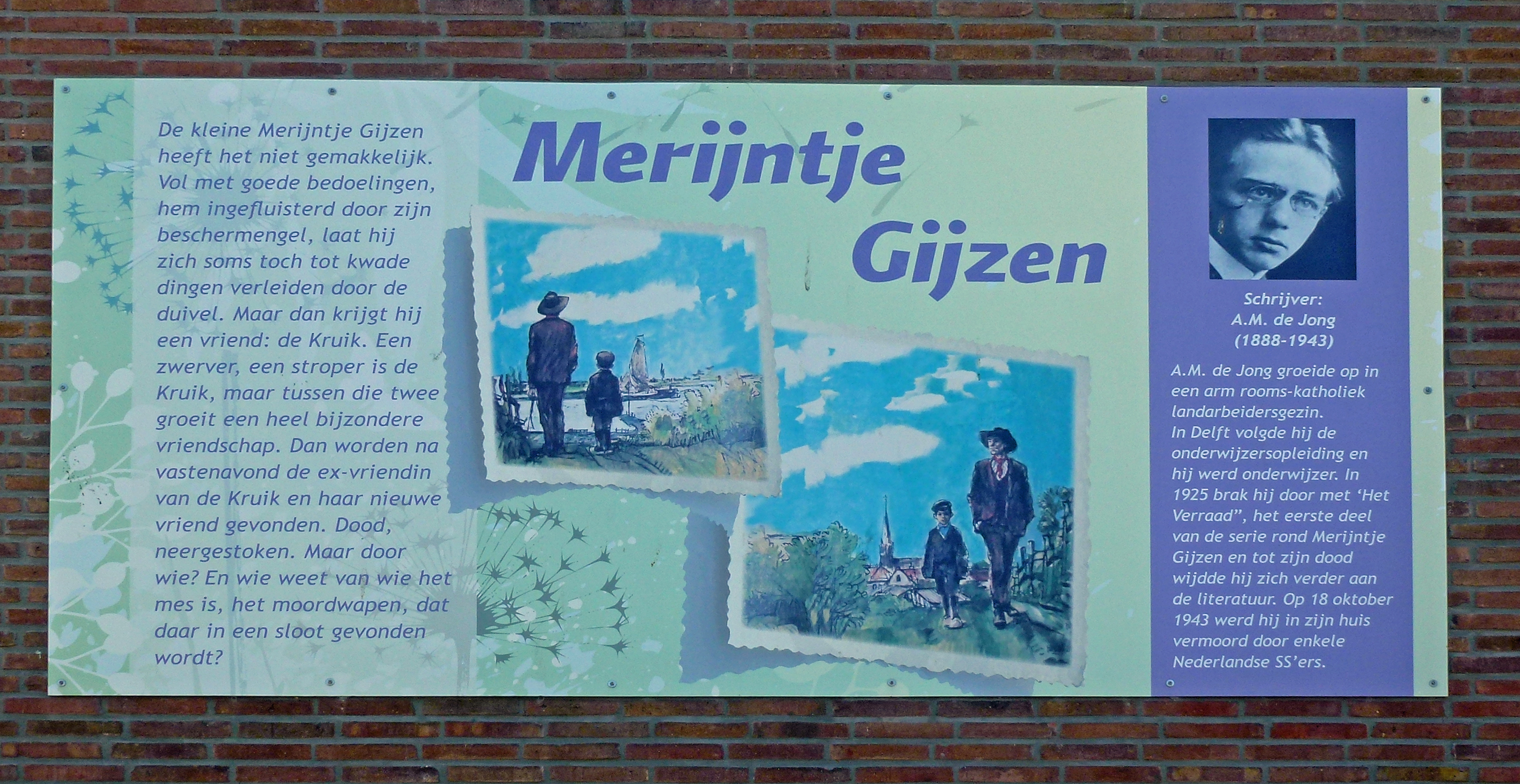 Straatnaam beschrijving. Merijntje Gijzen is geschreven door A. M. de Jong.